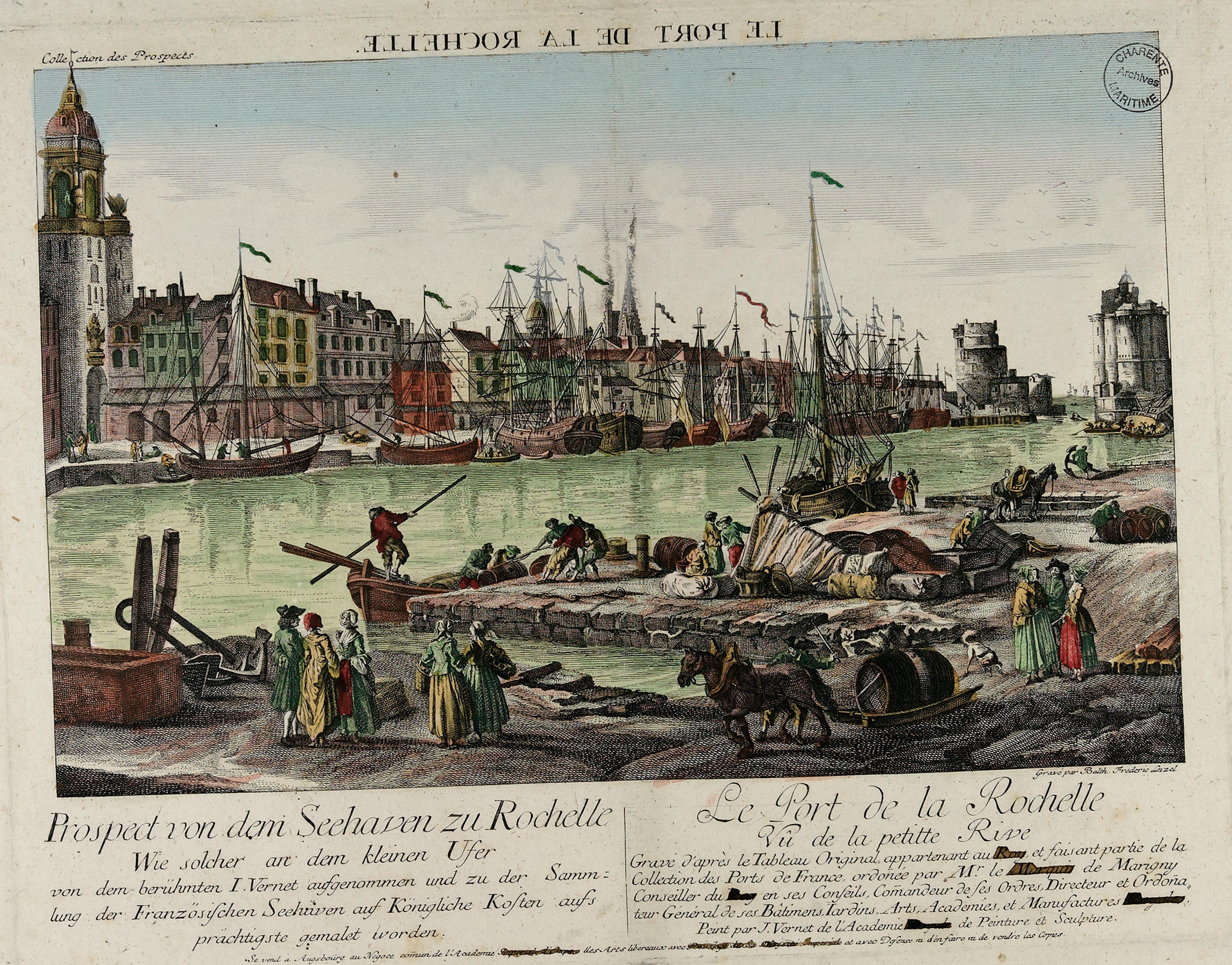 Gravure d'après un tableau ordonné par M. le Marquis de Marigny, conseiller du roi, Commandeur de ses Ordres, Directeur et Ordonnancier Général. Peint par J. Vernet de l'Académie de Peinture et Sculpture.